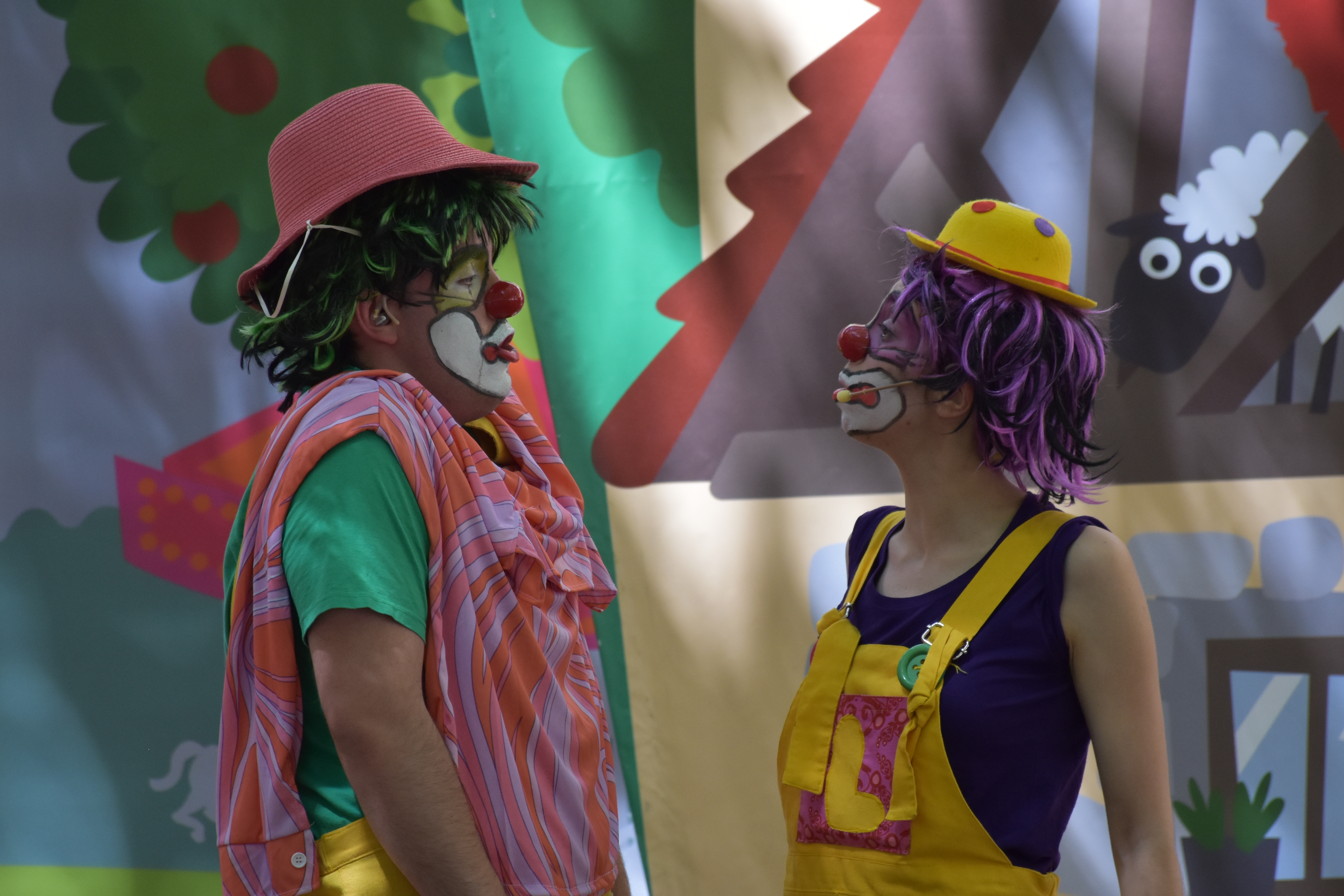 Potx eta Lotx Gasteizen